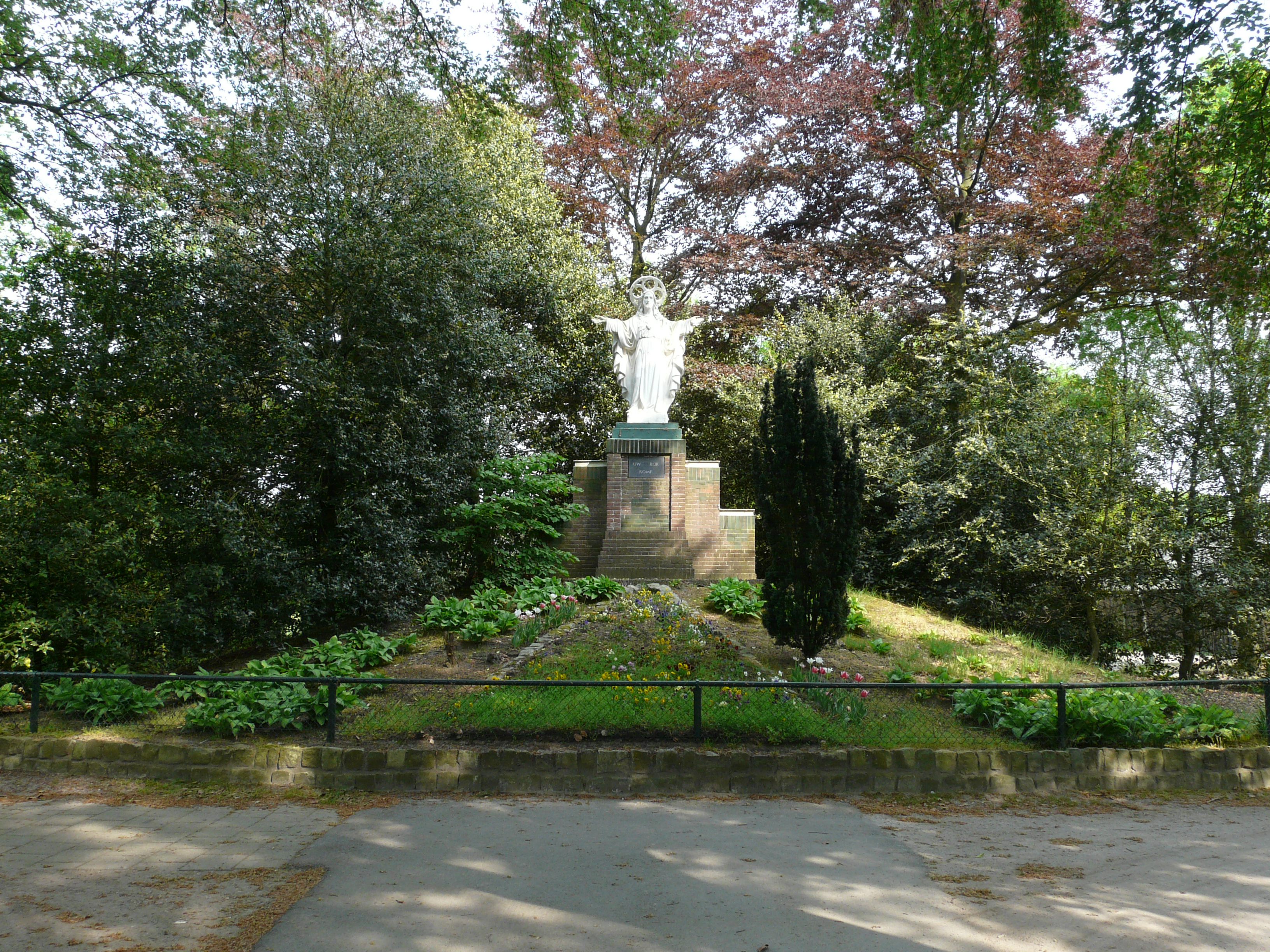 Beeld in de tuin van Zuiderhout in Teteringen